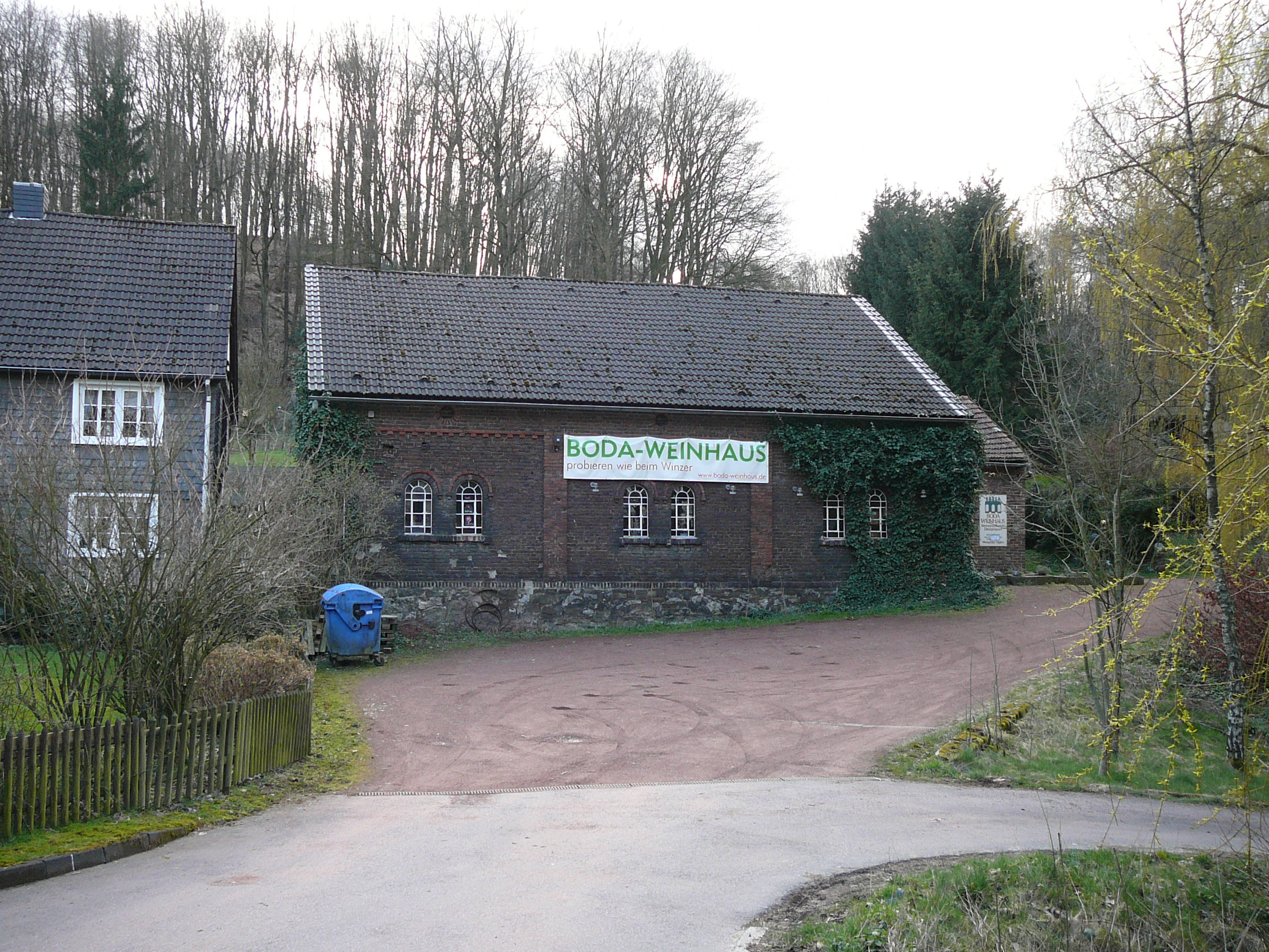 In der Beek, Wuppertal/Katernberg-Uellendahl